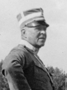 Urklipp på Lennart Lilliehöök från ett foto taget 1934 i Mölnarp i Skillingaryd.